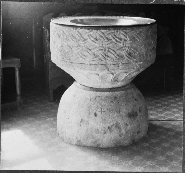 Dopfunt, 1100- eller 1200-talet, efter renovering. Kategori: (04) DopfuntarDopfunt, 1100- eller 1200-talet, efter renovering.